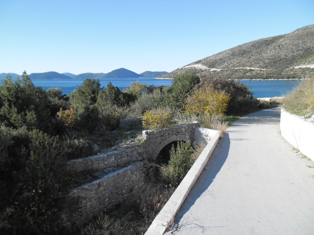 most u Budimi, Banići